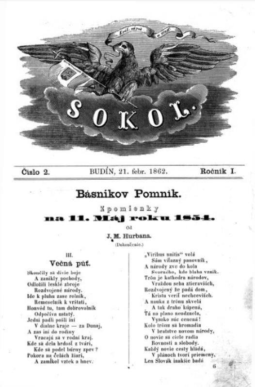 Titulný list časopisu Sokol : Obrázkový časopis pre zábavu, krásno, umenie, vedy a literatúru z r. 1862.